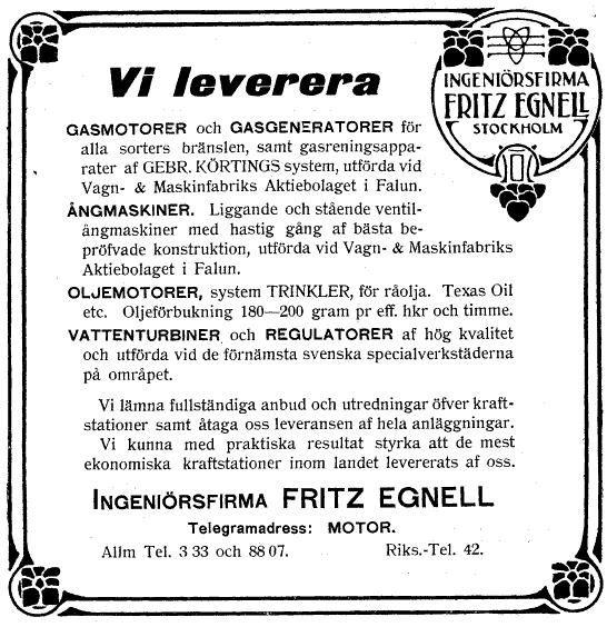 Ingeniörsfirma Fritz Egnell, reklam från 1906